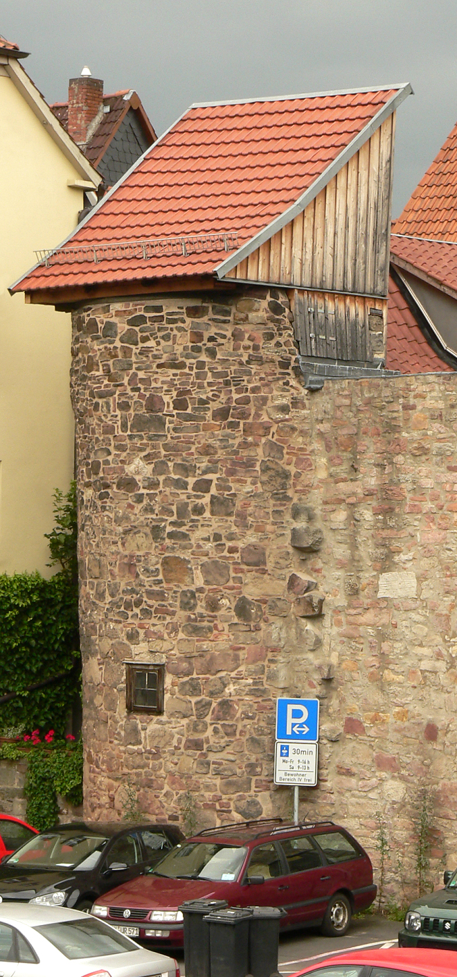 Dünner Turm der Stadtbefestigung Münden